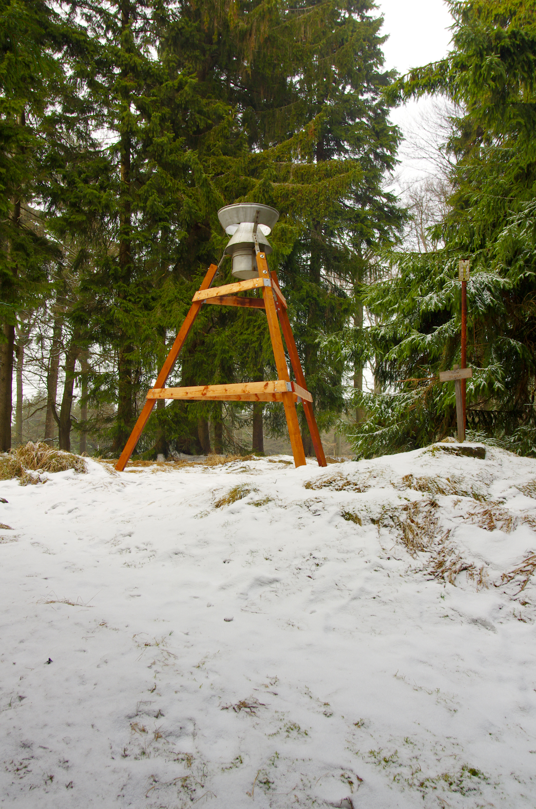 Lysina, druhá nejvyšší hora Slavkovského lesa (982 m n.m.), totalizátor (srážkoměr používaný k měření srážek za dlouhé období) umístěný na vrcholu, Slavkovský les, okres Cheb